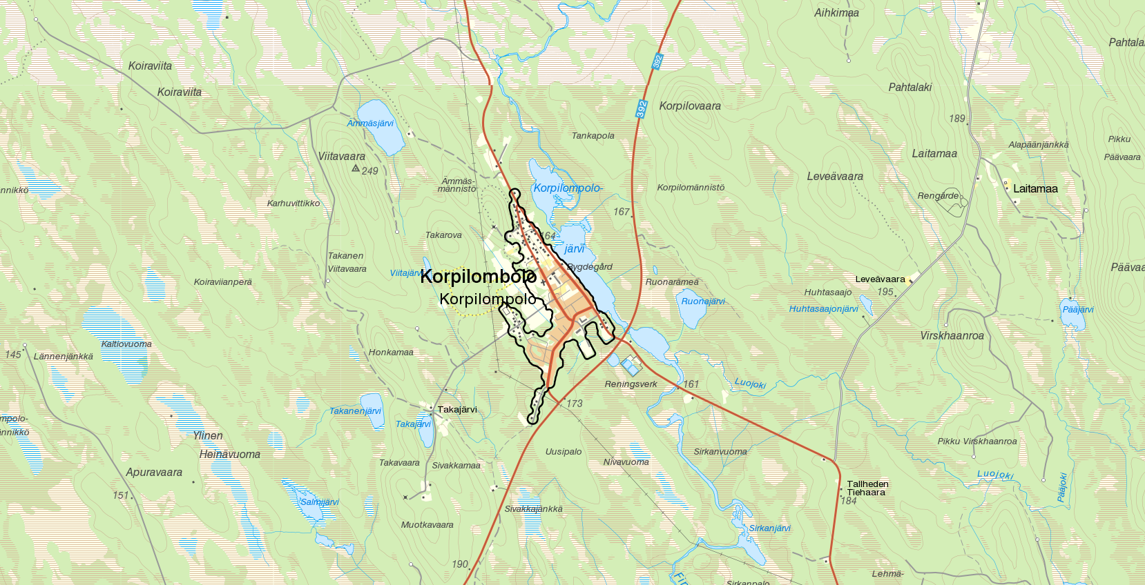 Tätorten Korpilombolo med gränserna från Statistiska centralbyråns tätortsavgränsning 2015. Bakgrundskarta från Lantmäteriet, skala 1:30 236.